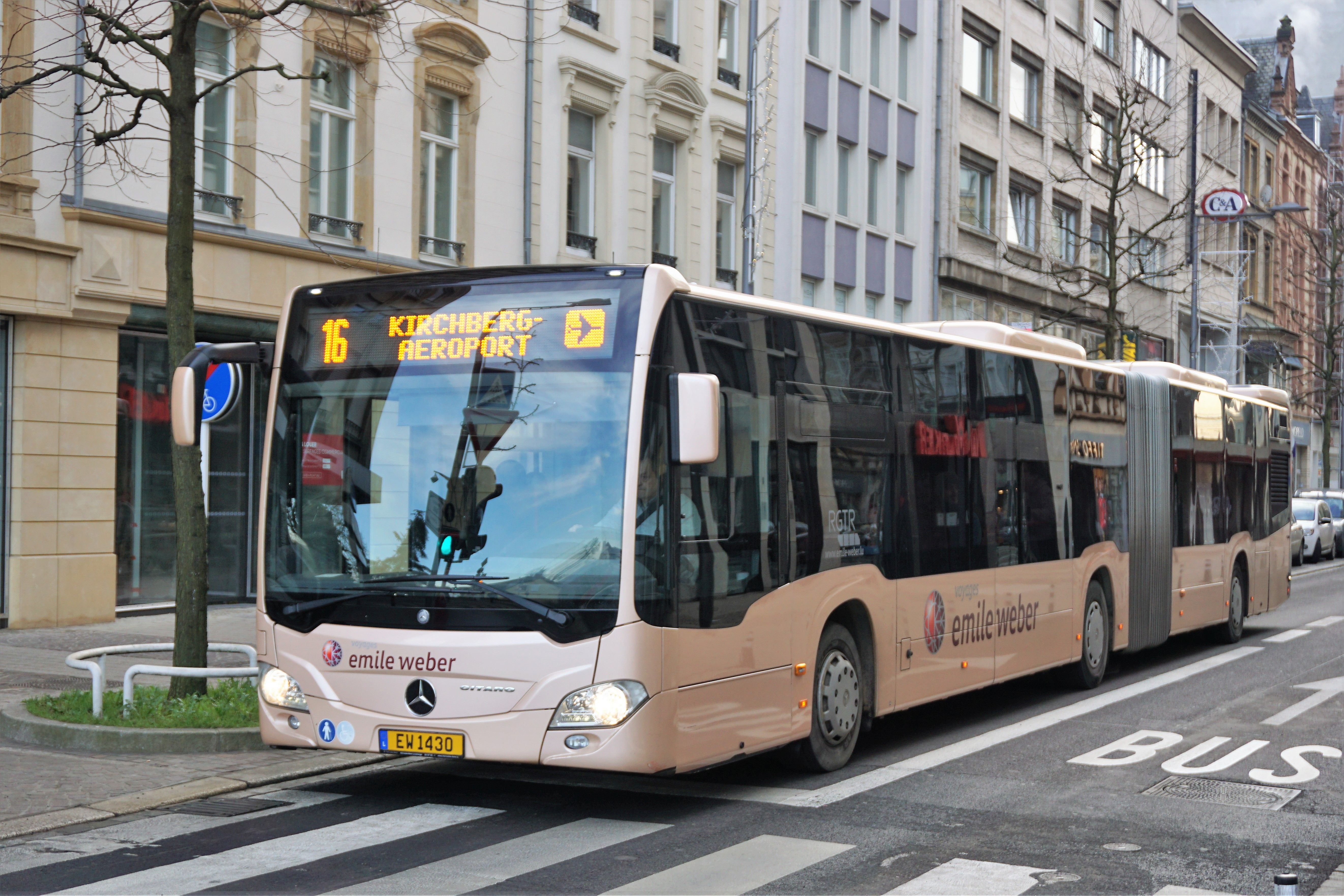 Luxembourg, bus "Emile Weber" (#EW1430) sur une ligne 16 dans l'avenue de la Gare en direction de l'Aéroport.